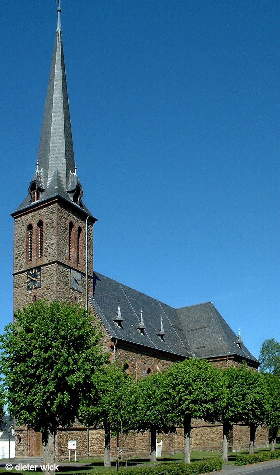 Kath. Kirche "St. Bartholomäus", Gackenbach